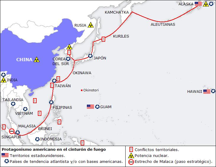 Mapa geopolítico|geopolítico de Asia oriental